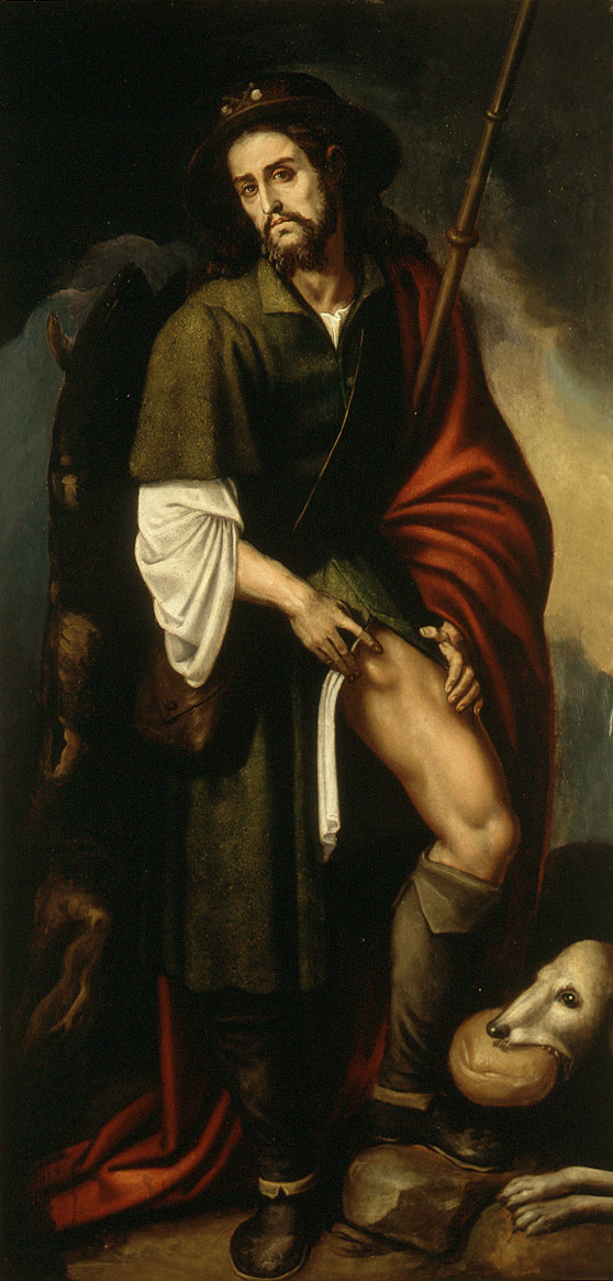 La obra representa a San Roque, y fue adquirida en 1990 por la Generalitat Valenciana.